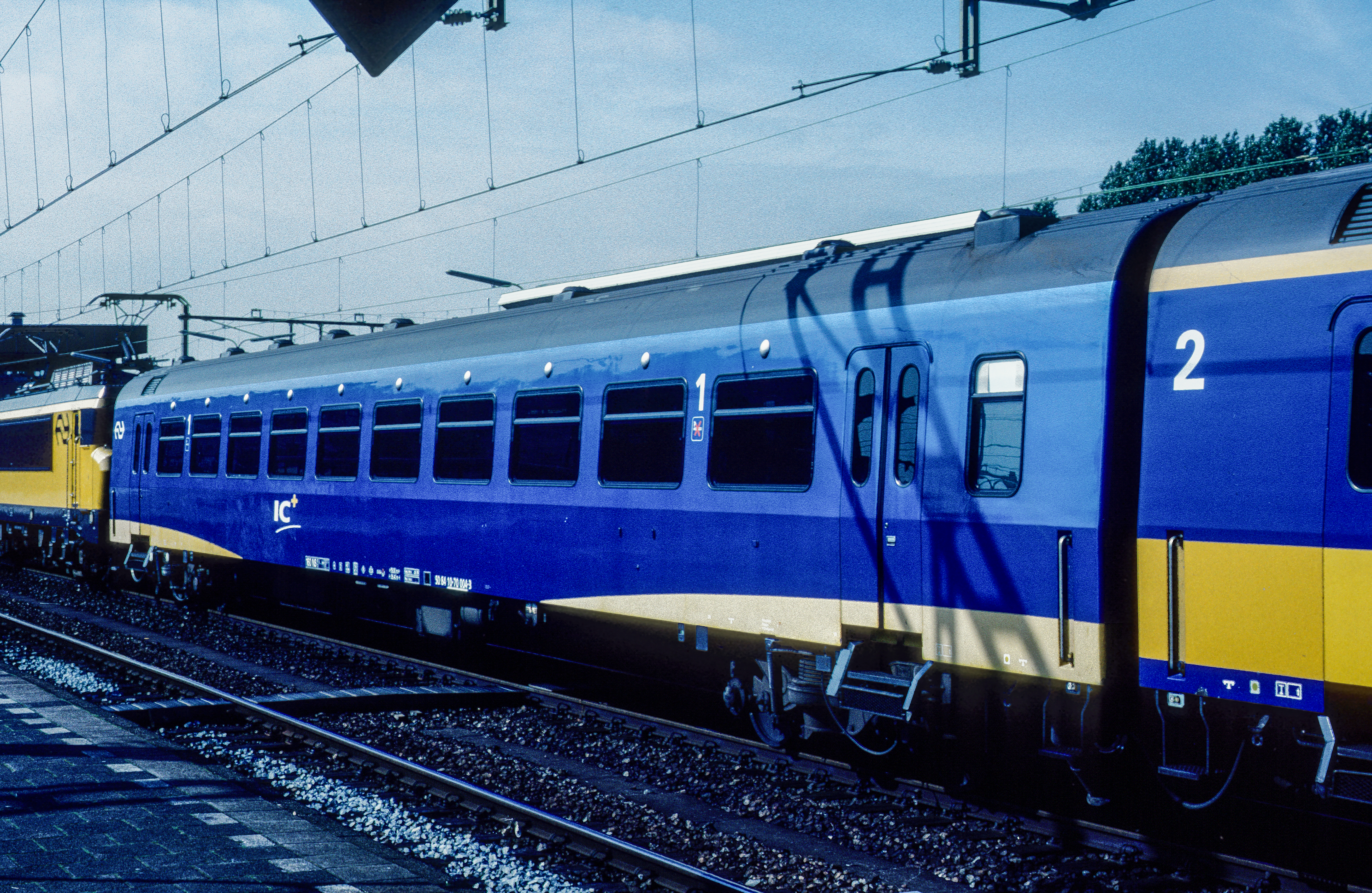 50 84 10-70 004-3 IC 2544 Heerlen - Den Haag Centraal Rotterdam Centraal 22-09-2000